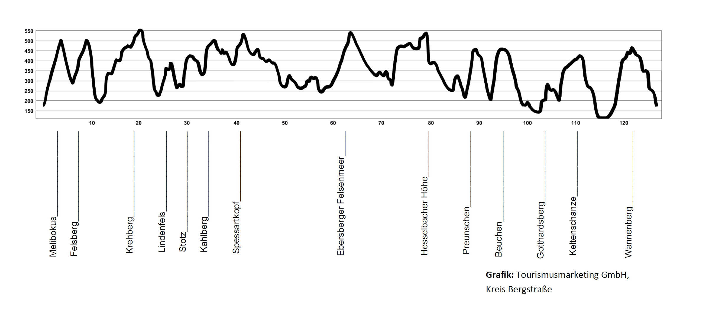 Höhenprofil des Nibelungensteigs